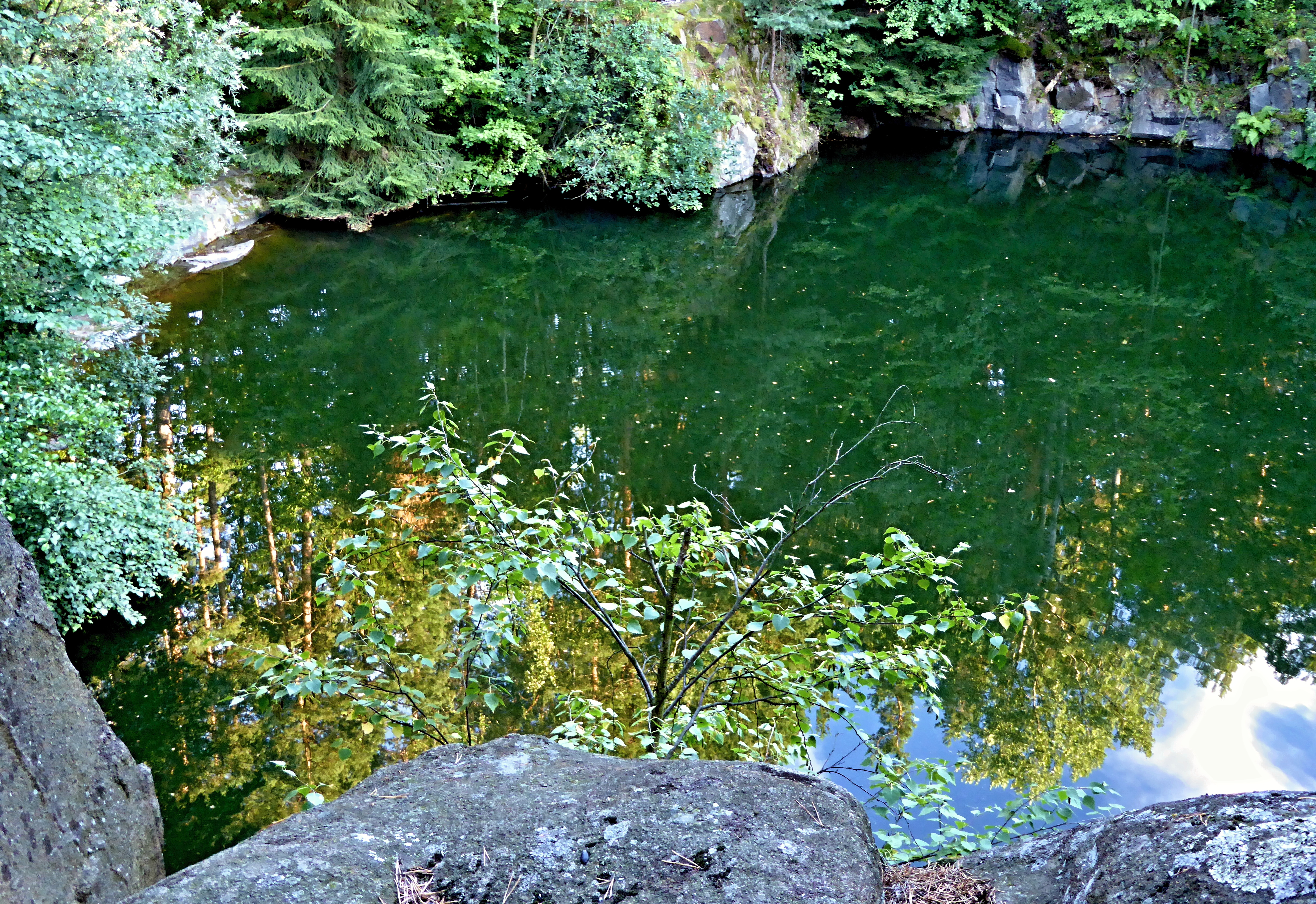 Žulová naučná stezka v prostoru návrší Horka (k.ú. Skuteč) na území Skutečské pahorkatiny prochází kolem bývalých kamenolomů, které jsou většinou zatopené vodou. V záběru ze skal zatopený lom založený kolem roku 1926, ve kterém v letech 1939-1942 těžil kámen jeho nájemce Michal Andrusiv, po němž se mu pomístně též říká Andrusák. Provoz v kamenolomu, jehož jáma měla hloubku 26 m a rozměry cca 90 x 50 m, byl zastaven nařízením úřadů v době Protektorátu Čechy a Morava. Kamenolom expedoval dlažbu především pro obce a města severovýchodních Čech. Dnes zatopený lom dotváří přírodní scenerii lesní lokality se zastavením č. 8 s informační tabulí a odpočívadlem na Žulové naučné stezce.